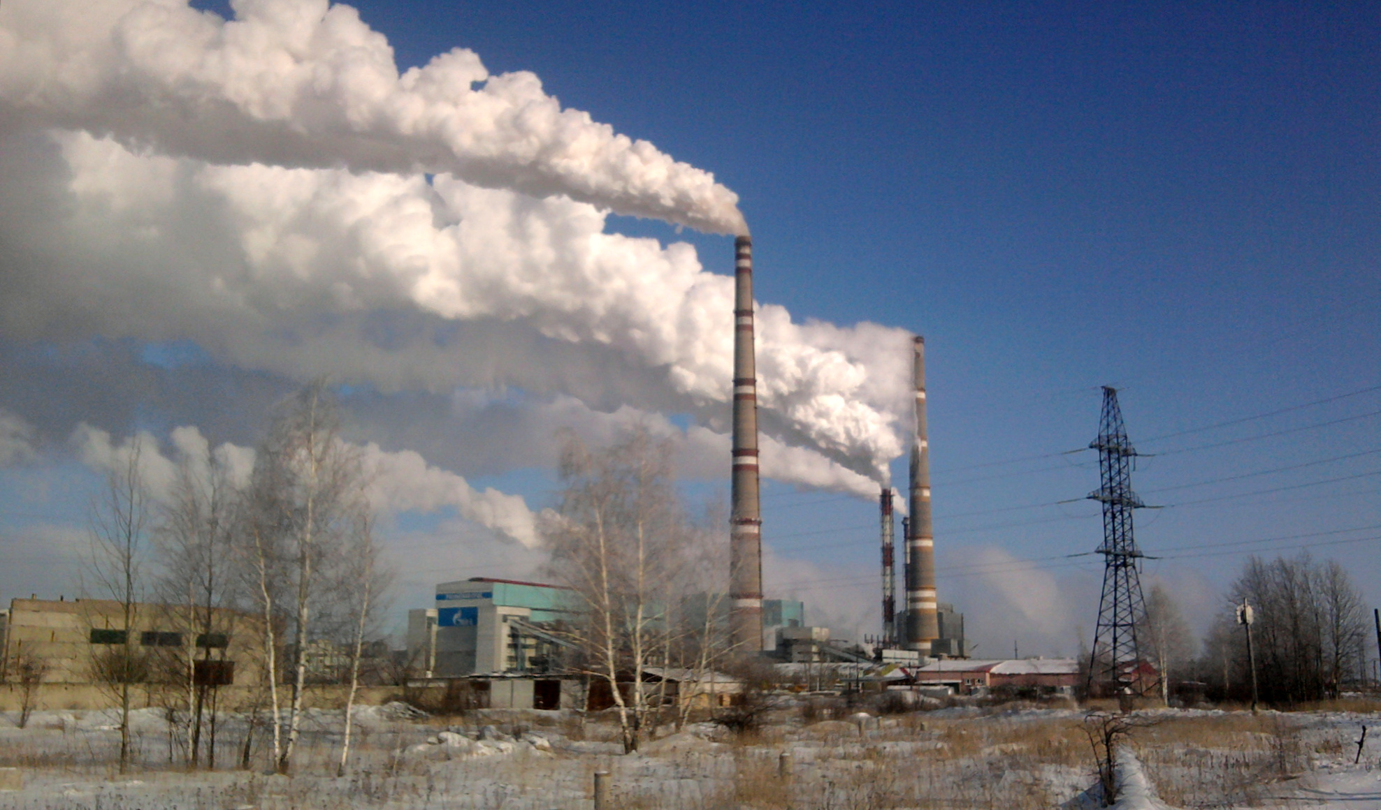 Вид на ГРЭС